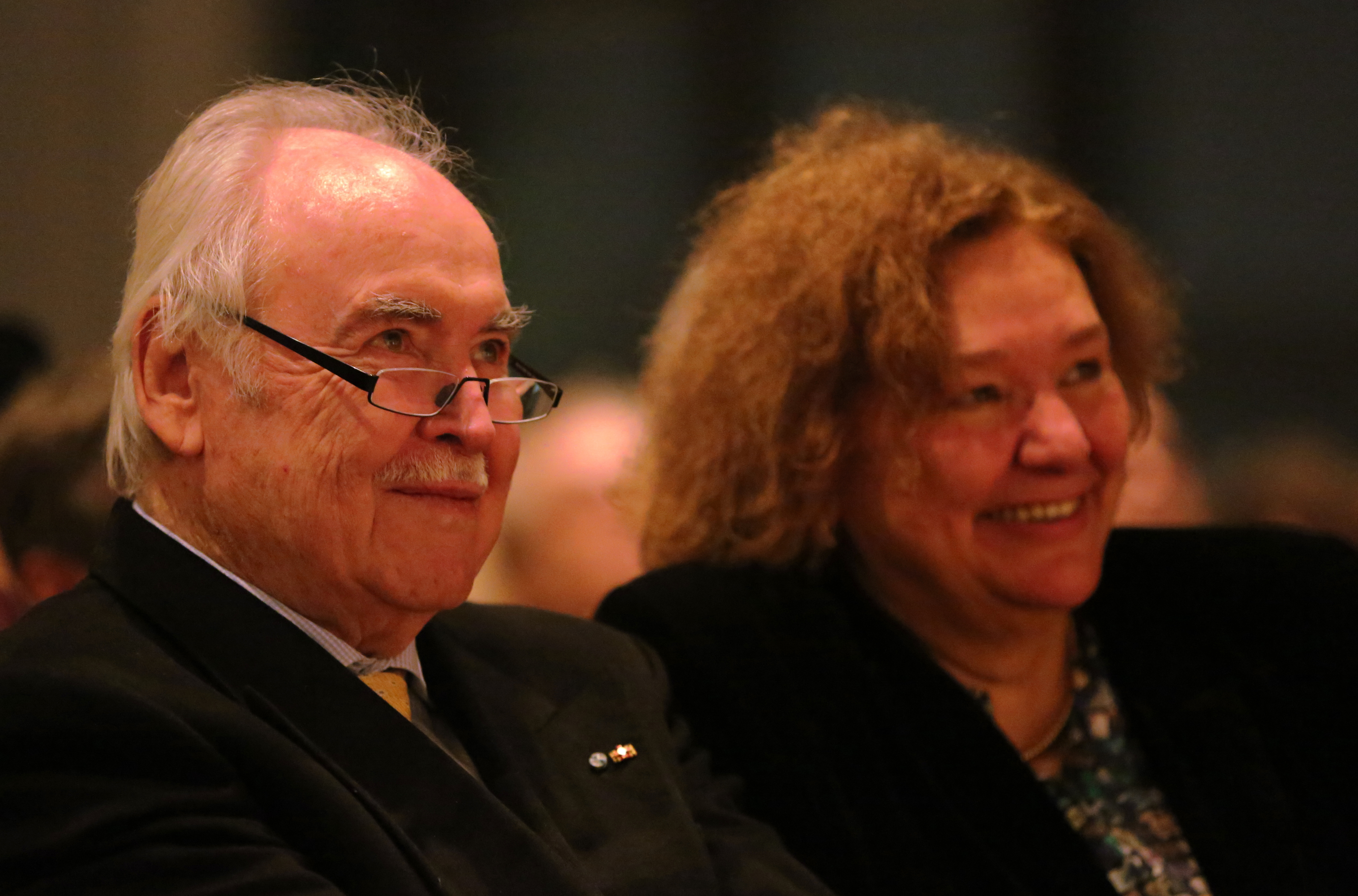 Dieter und Mercedes Hanitzsch bei der Verleihung des Ernst-Hoferichter-Preises 2019 an Dieter Hanitzsch im Münchner Literaturhaus